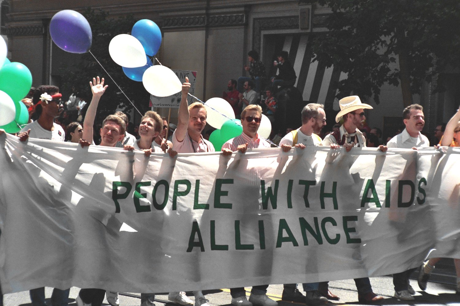 San Francisco, June 1986